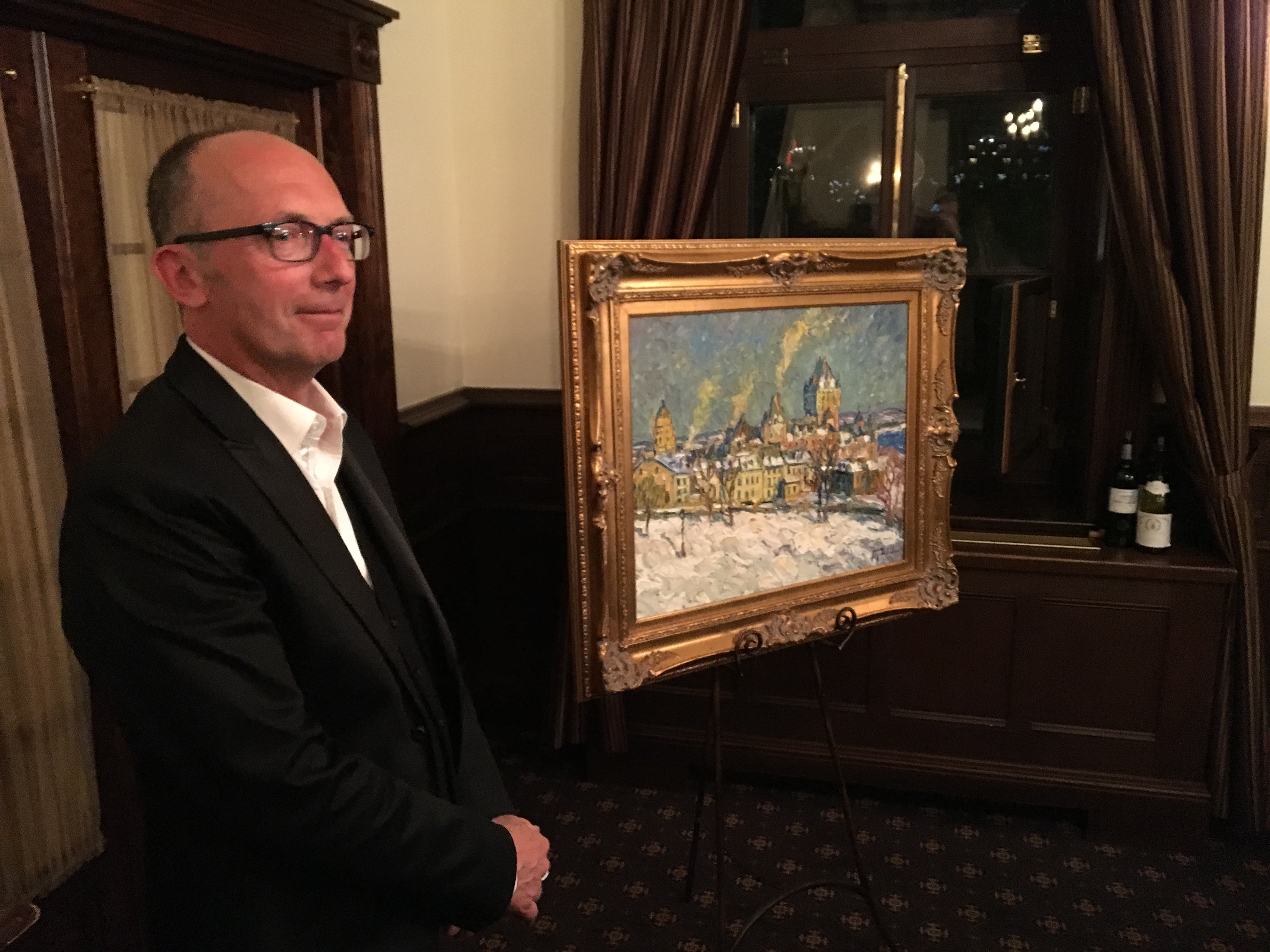 M.Raynald Leclerc lors de la remise d'une oeuvre lors de son hommage au Cercle de la Garnison de Québec